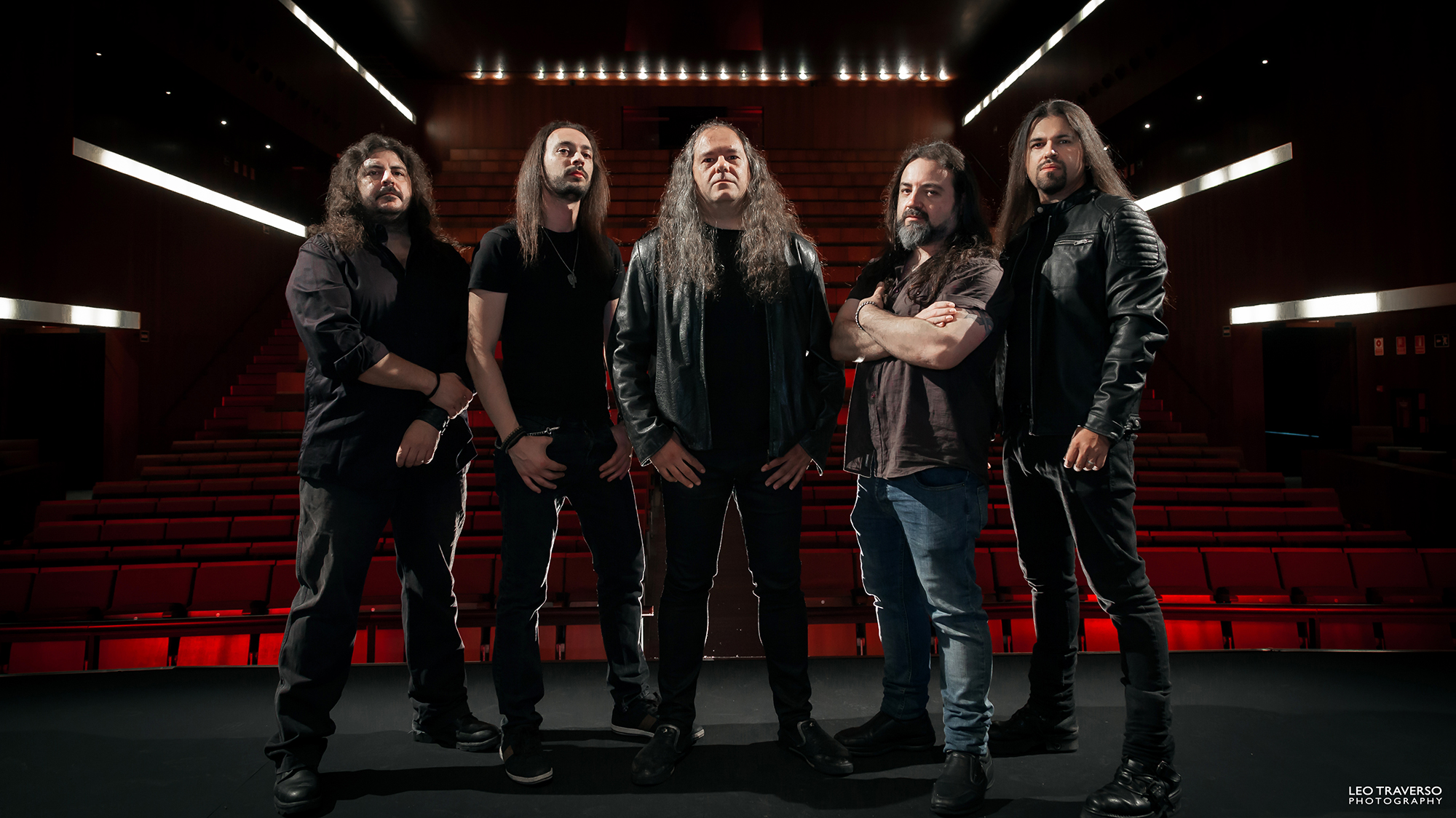 Sphinx - Formación 2019